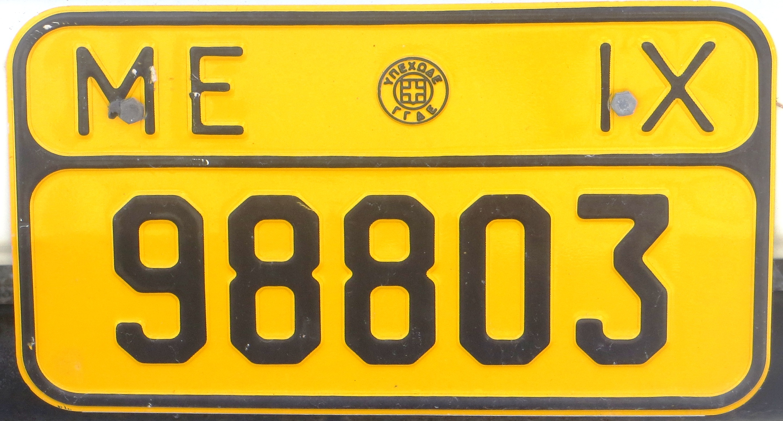 Oud vrachtwagen kenteken Griekenland